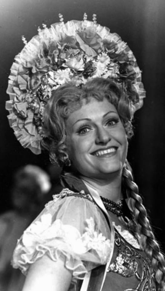 Magyaros öltözékben látható Domonkos Zsuzsa.